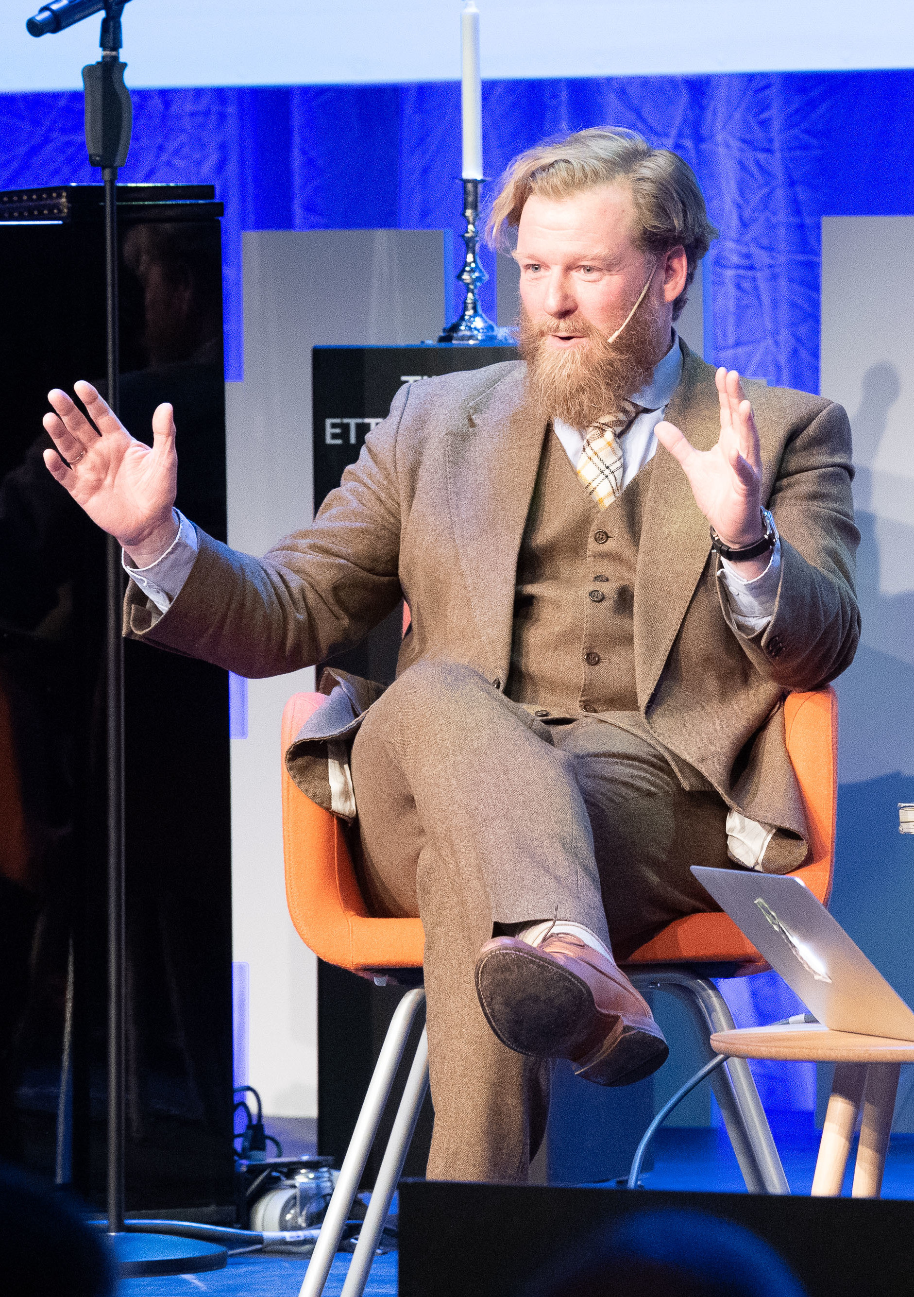 Linda Eides mediespråksjov